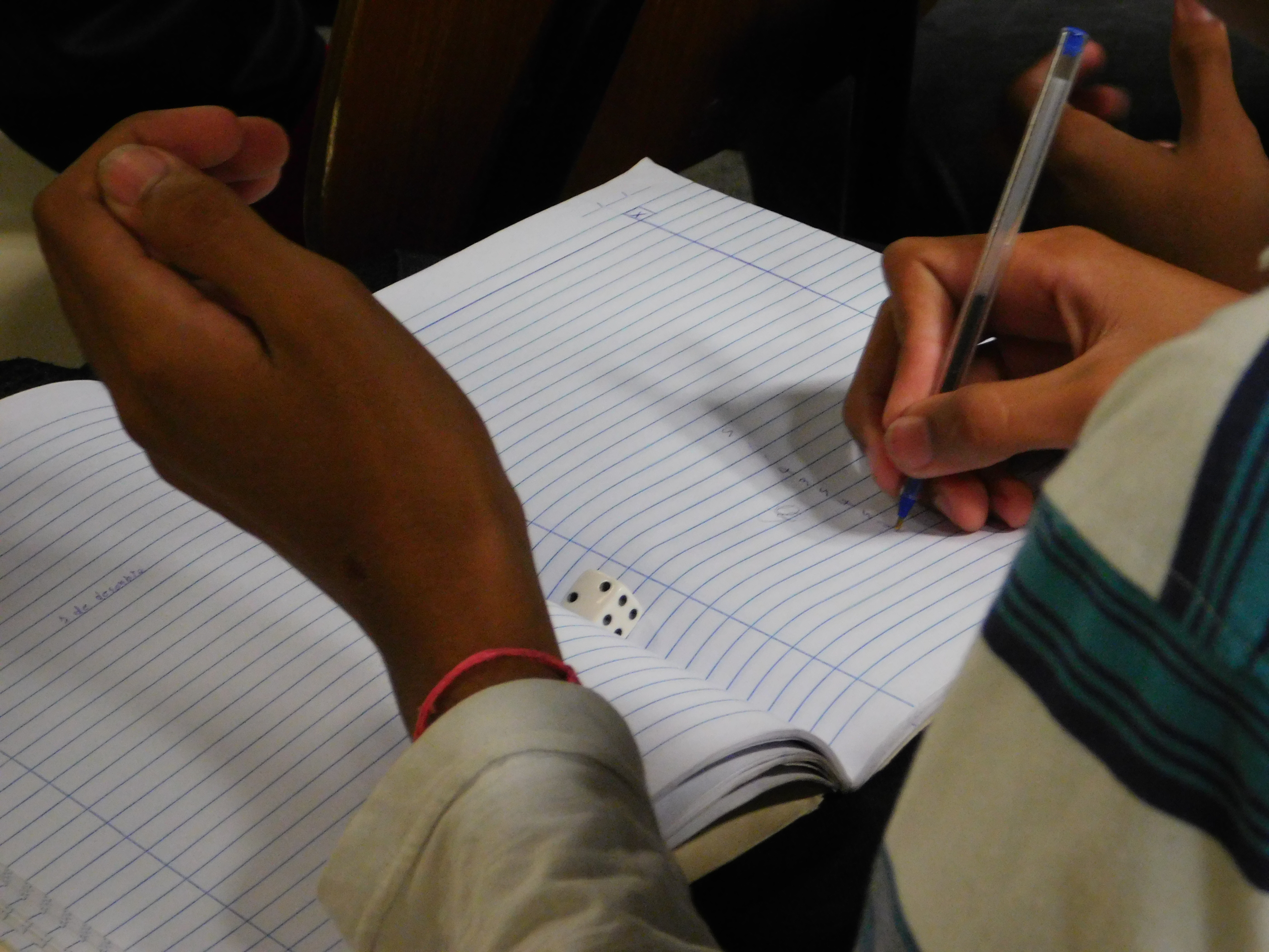 Atividade de educação ligada ao escopo de difusão científica promovida pelo NeuroMat na EMEF Solano Trindade, escola paulistana localizada no bairro Jardim Boa Vista, Zona Oeste de São Paulo. (dezembro de 2016) A atividade foi conduzida pelo professor Fernando da Paixão, que explicou aos alunos as atividades do centro de pesquisa por meio de experiências simples, como os experimentos oculares realizados pelo físico alemão Hermann von Helmholtz e a lei dos grandes números.